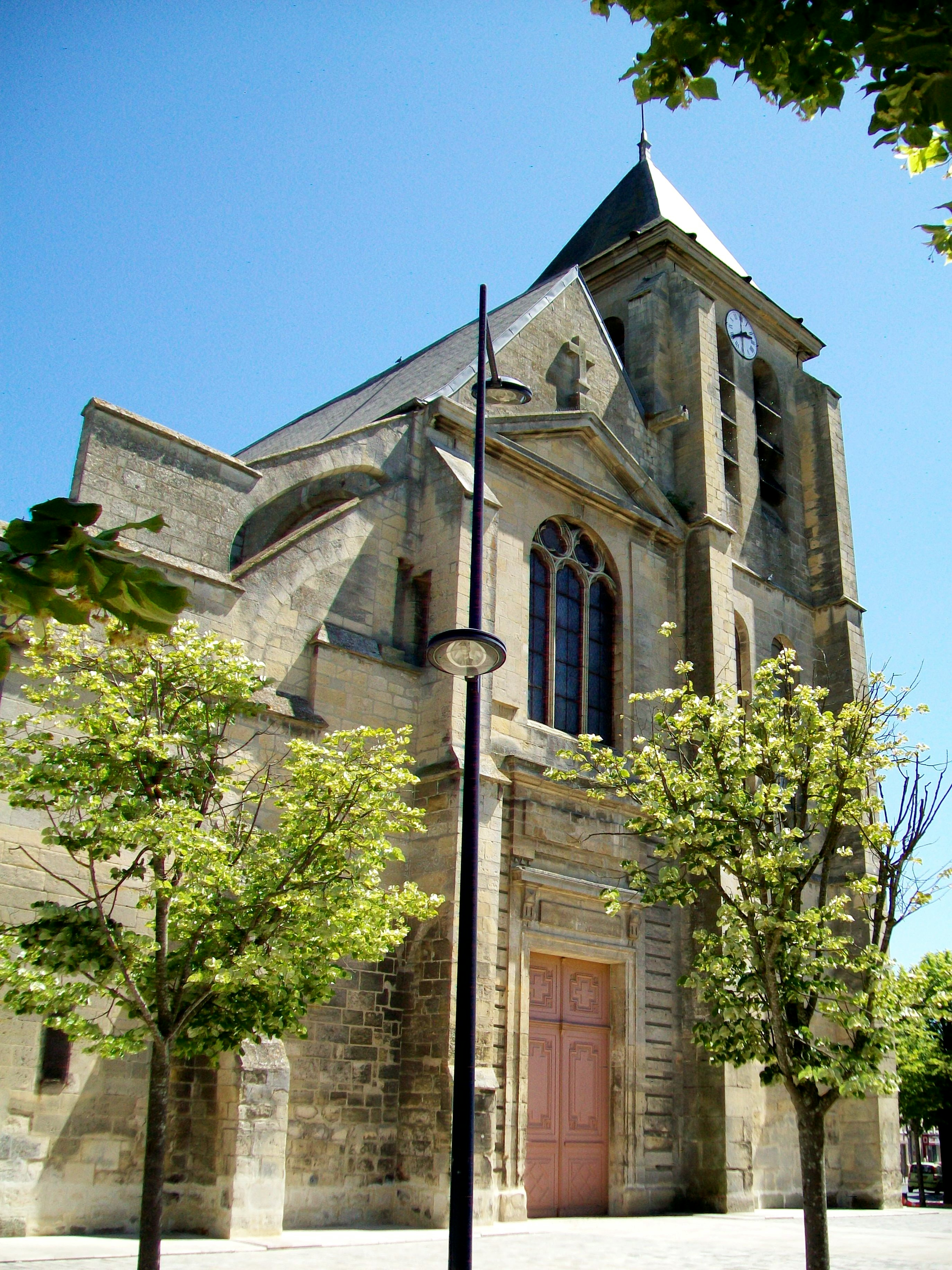 La façade ouest de l'église Sainte-Geneviève, d'une architecture très composite, avec un portail de style classique qui détonne sur cet édifice où l'influence gothique domine.